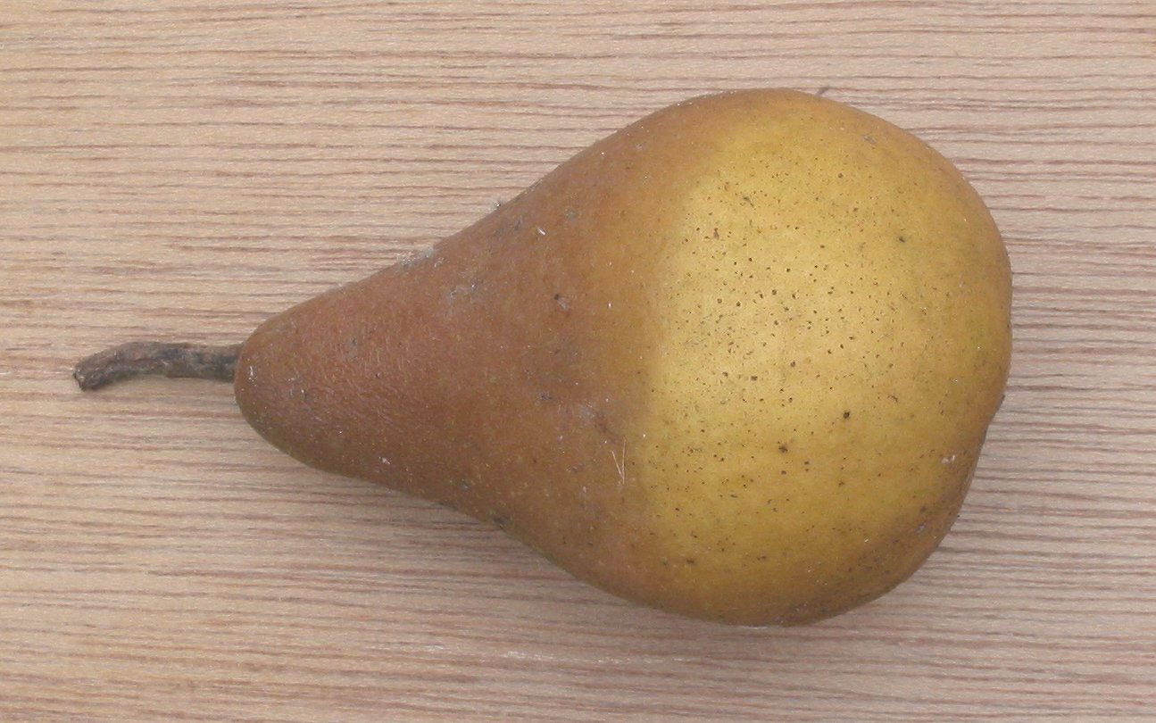 (nl: stoofpeer met steelrot) Pyrus communis Gieser Wildeman stalk rot